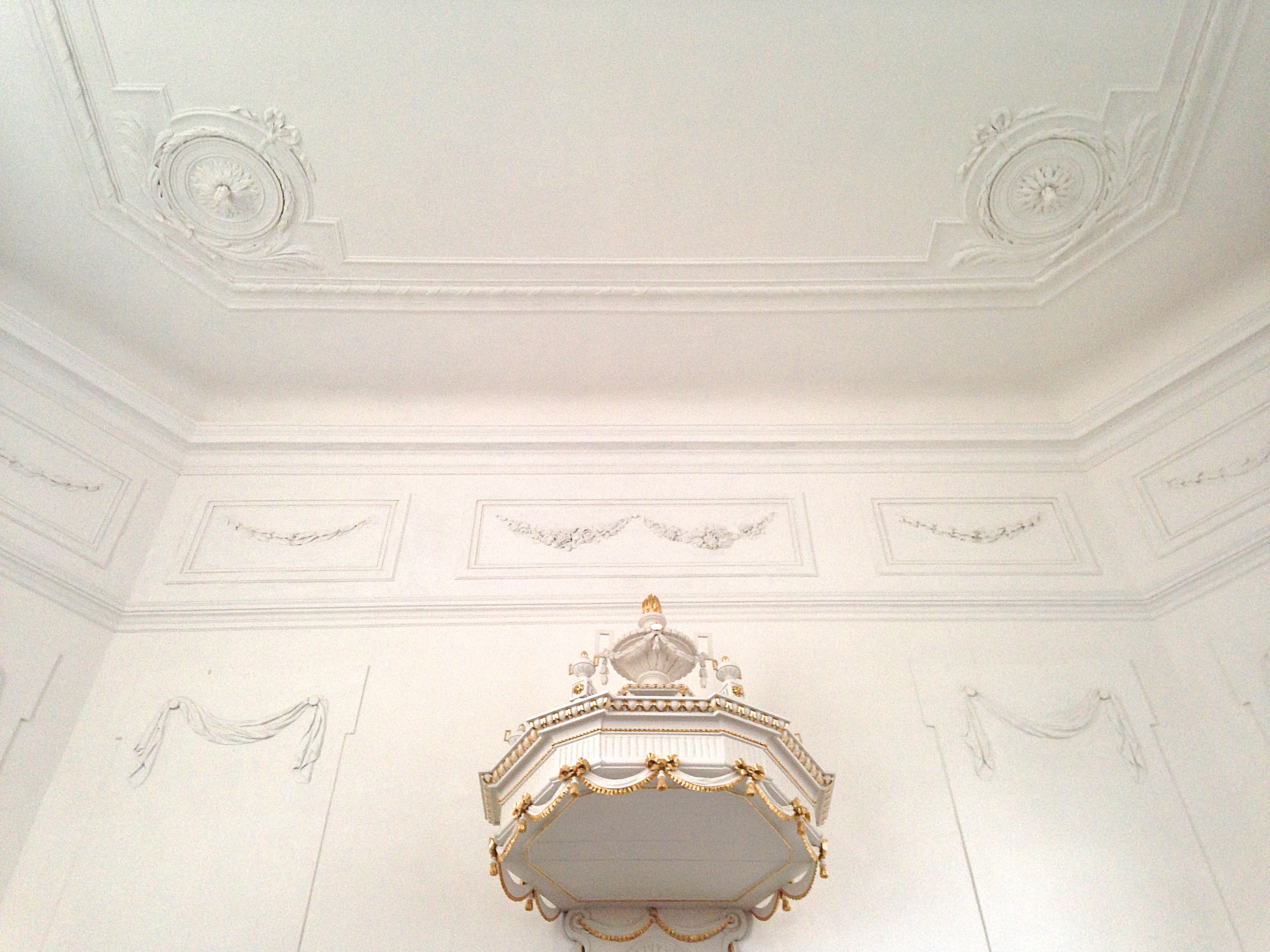 Stuckaturen im Stil des Louis-seize.